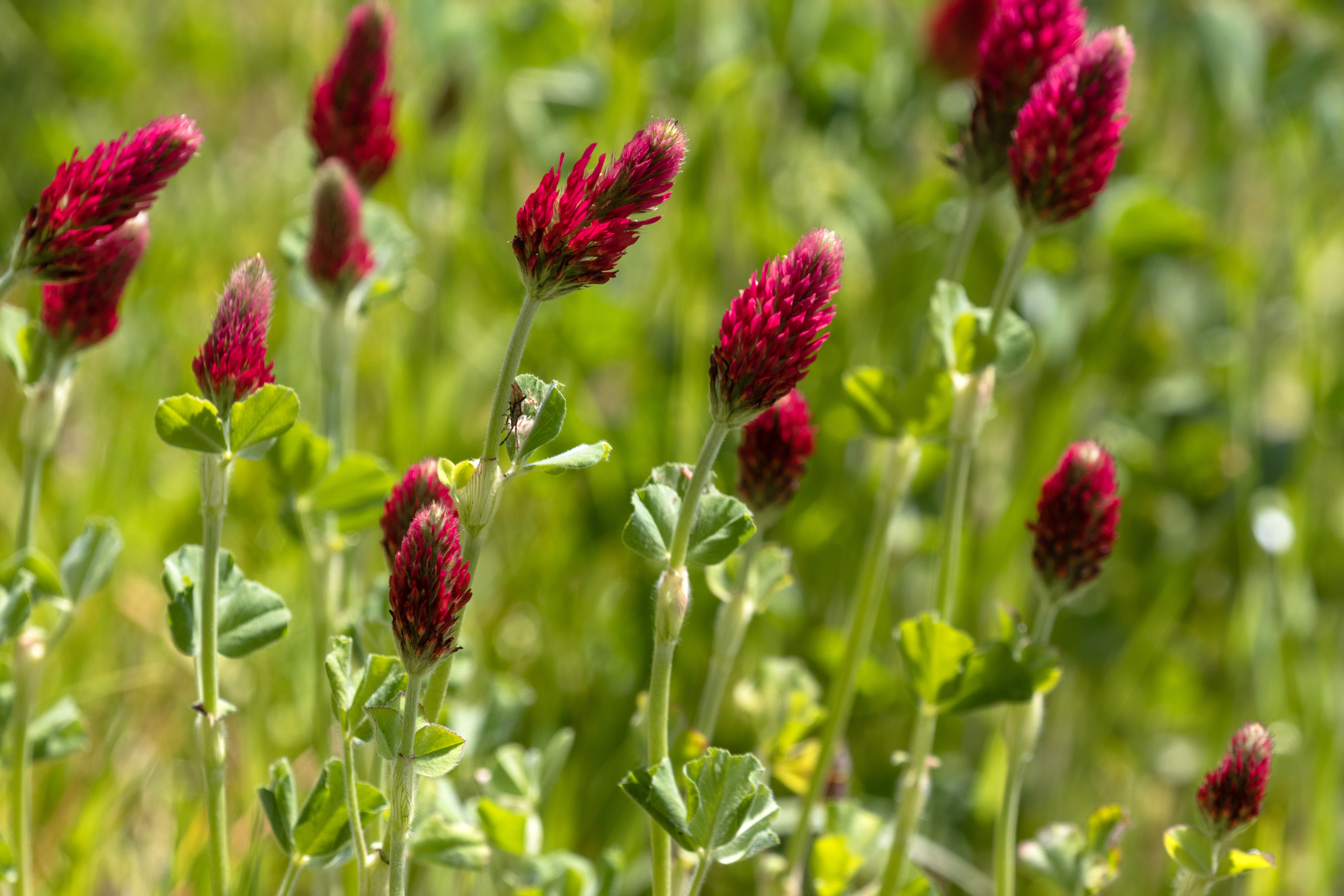 Blutklee im Altmühltal im Frühling, Landschaftsschutzgebiet Schutzzone im Naturpark Altmühltal